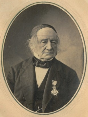 Gottlieb Matthias Carl Masch, Porträtfotografie, zwischen 1874 und 1878, Volkskundemuseum Schönberg